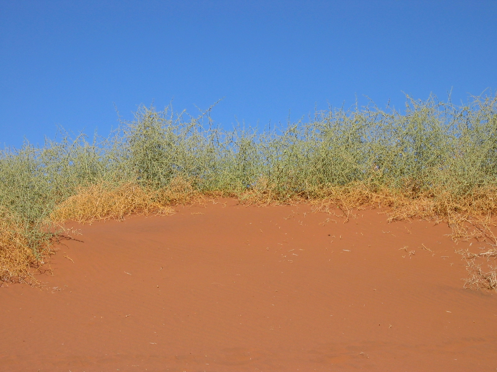 Nara Pflanze auf einer Düne; Butterpits plant on a dune